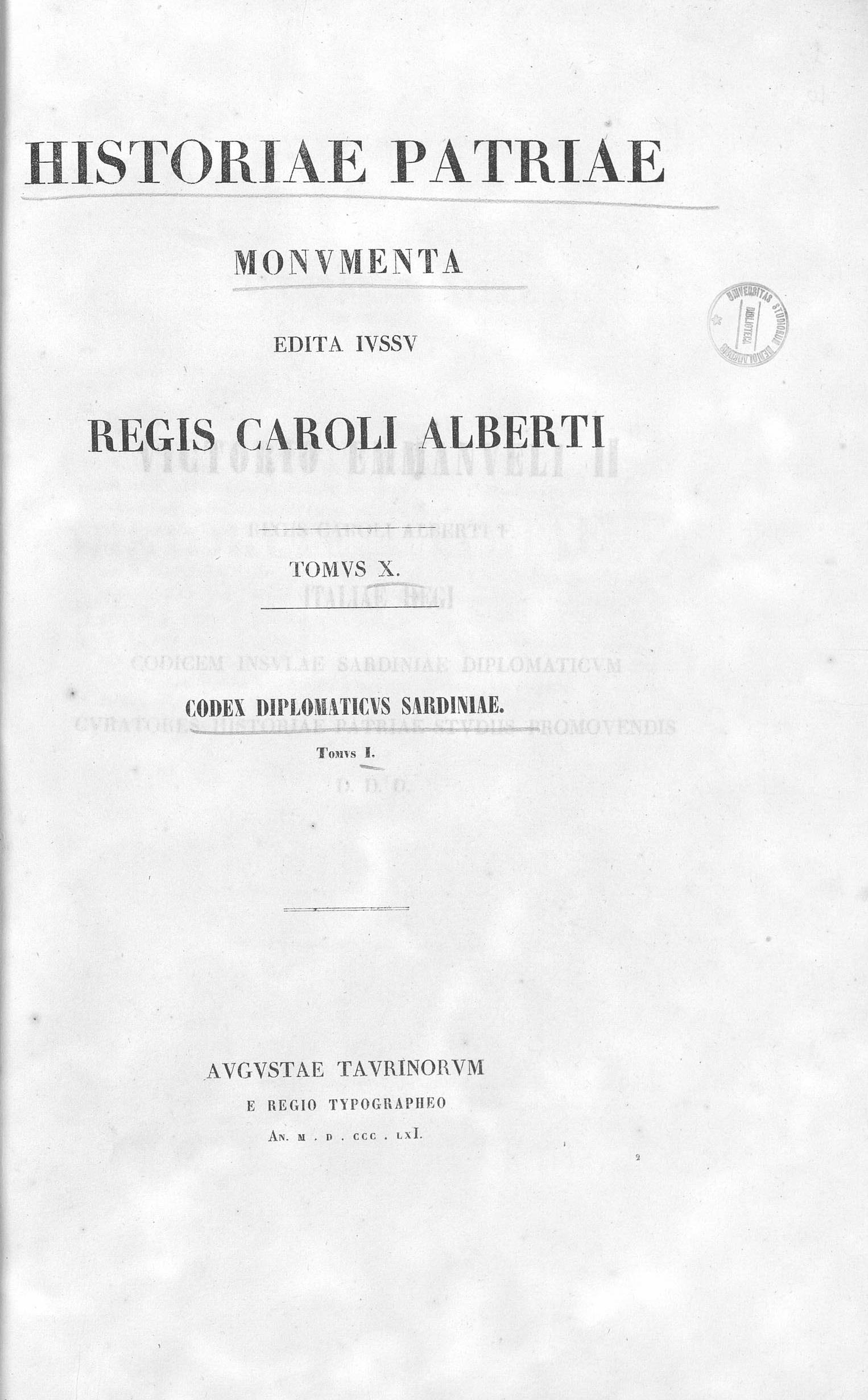 Frontespizio